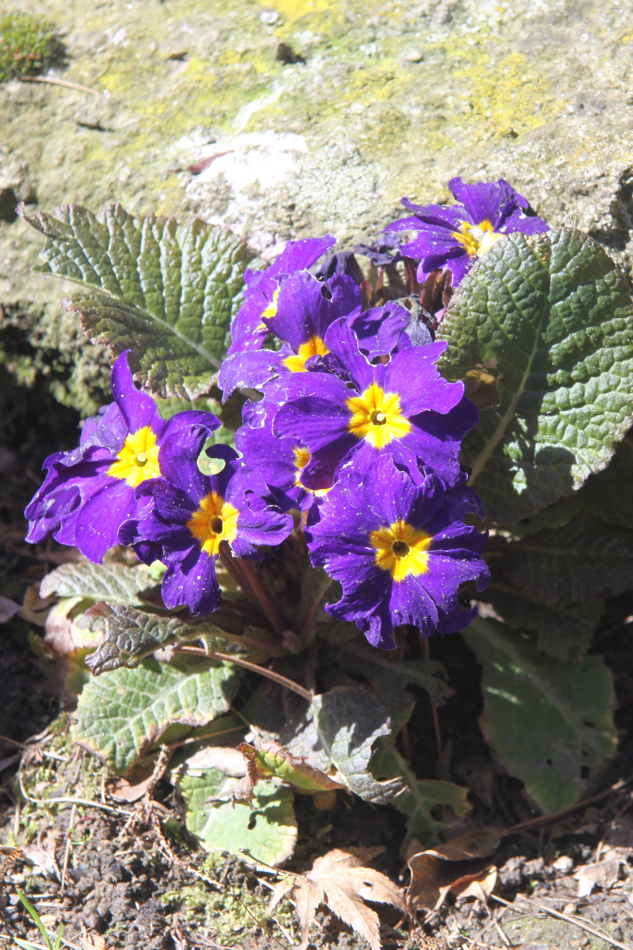 Primula x polyantha